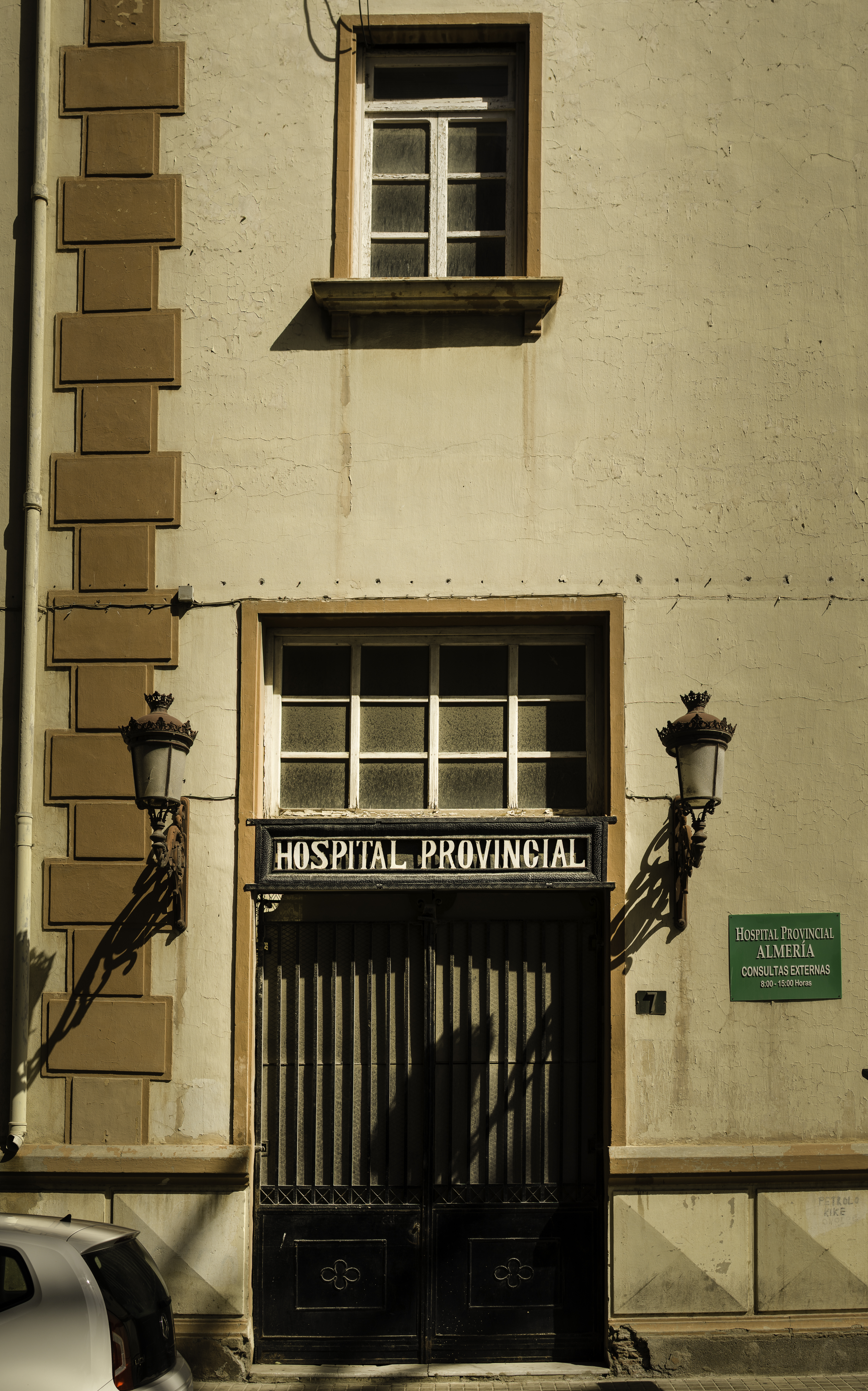 Hospital Provincial de Santa María Magdalena